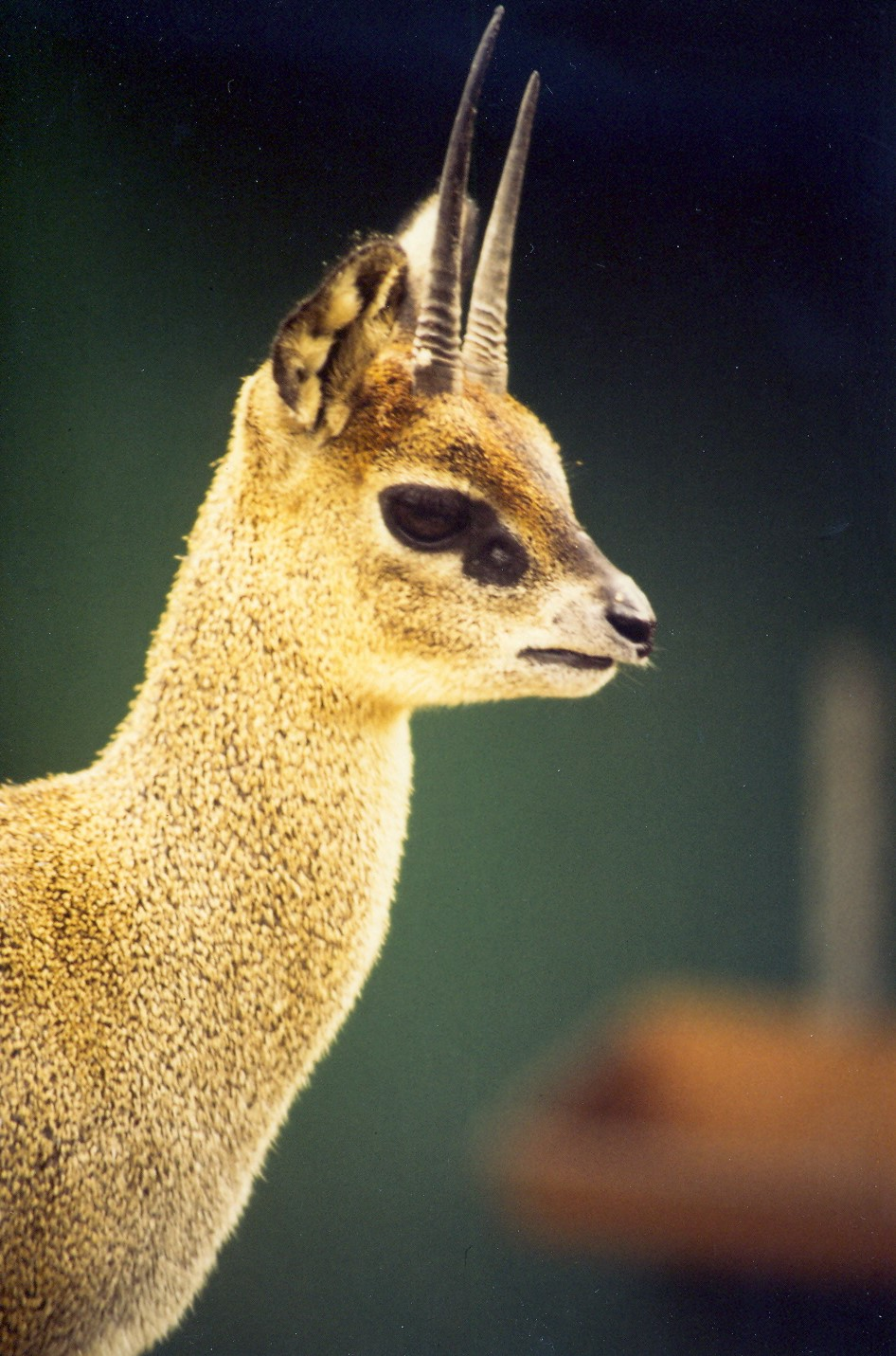 Klippspringer (Oreotragus oreotragus) - Frankfurter Zoo